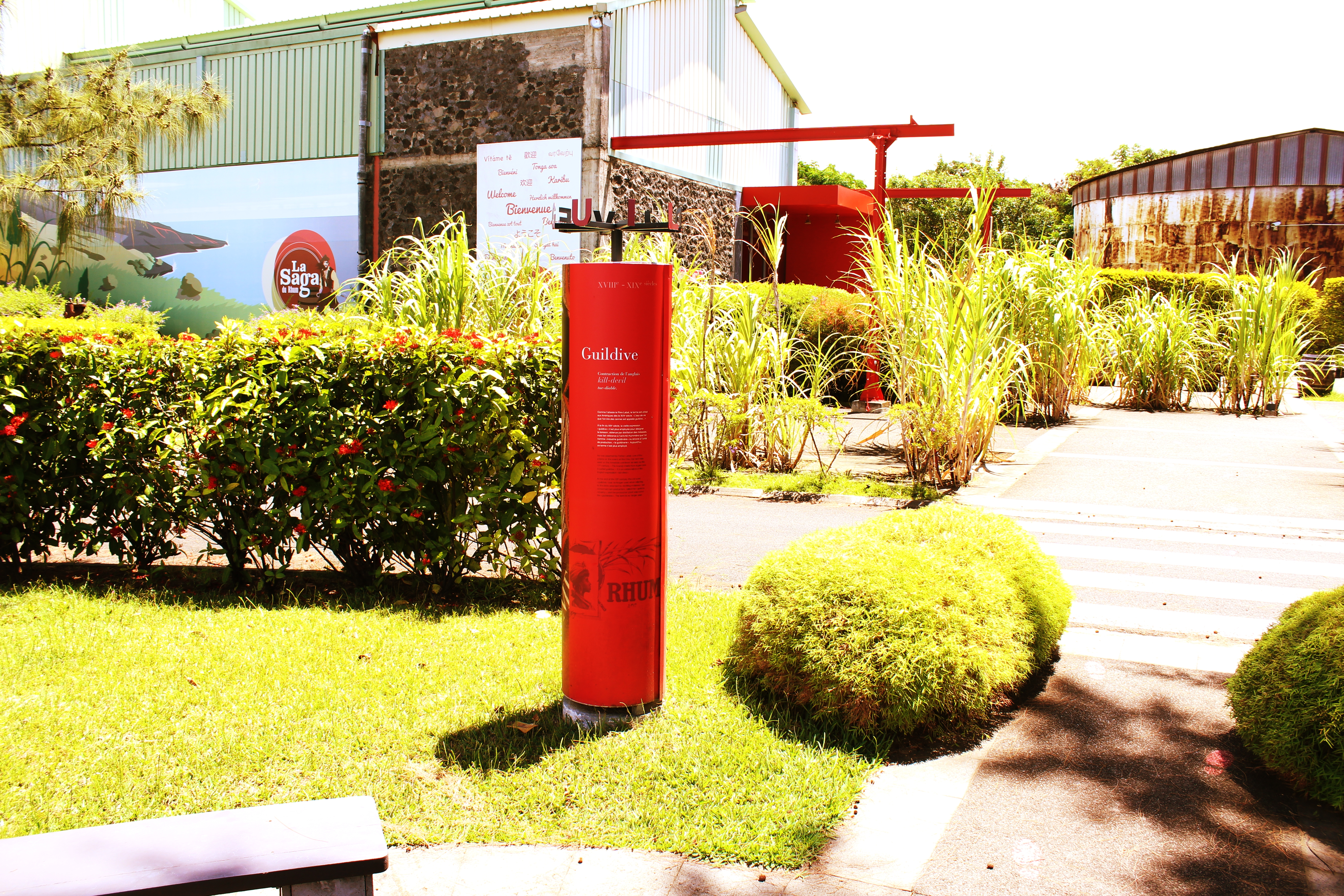 Entrée de la Saga du Rhum. Photo Lucas Payet, 2019